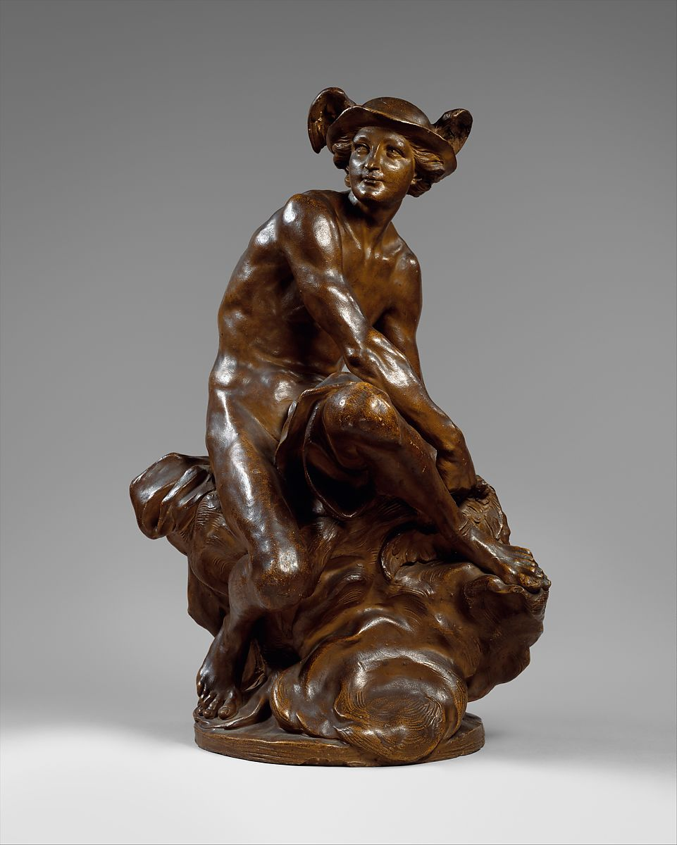 Escultura en bronce de Mercurio atándose las alas inspirada en el original de J.B. Pigalle. Se encuentra en el Metropolitan Museum de Nueva York.